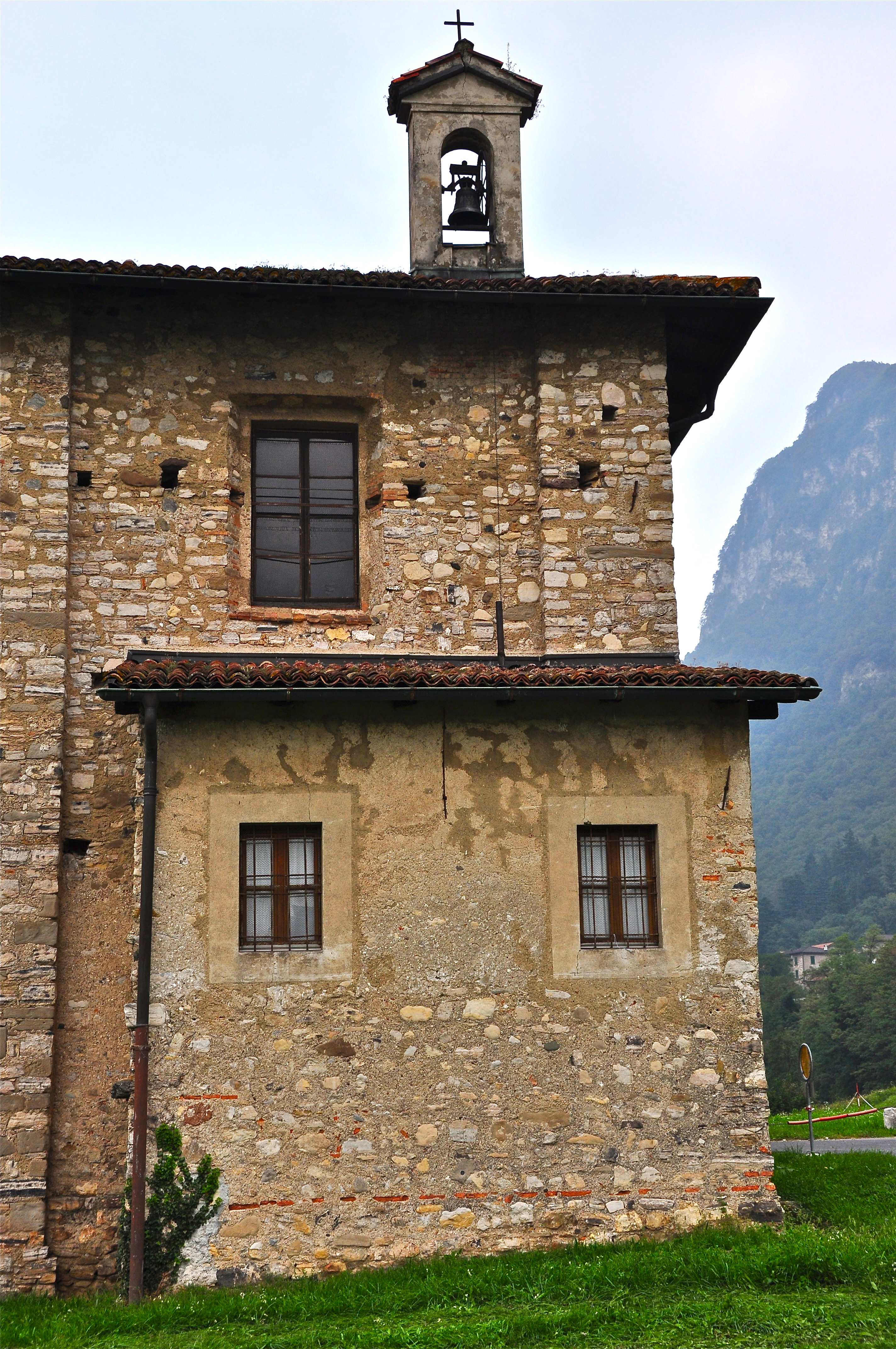 Vista della torre.